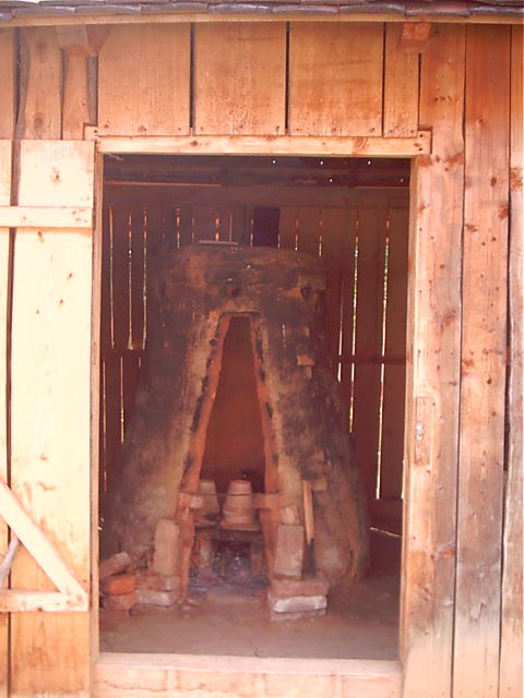 Fazekas-kemence, Magyarszombatfa Fazekasház